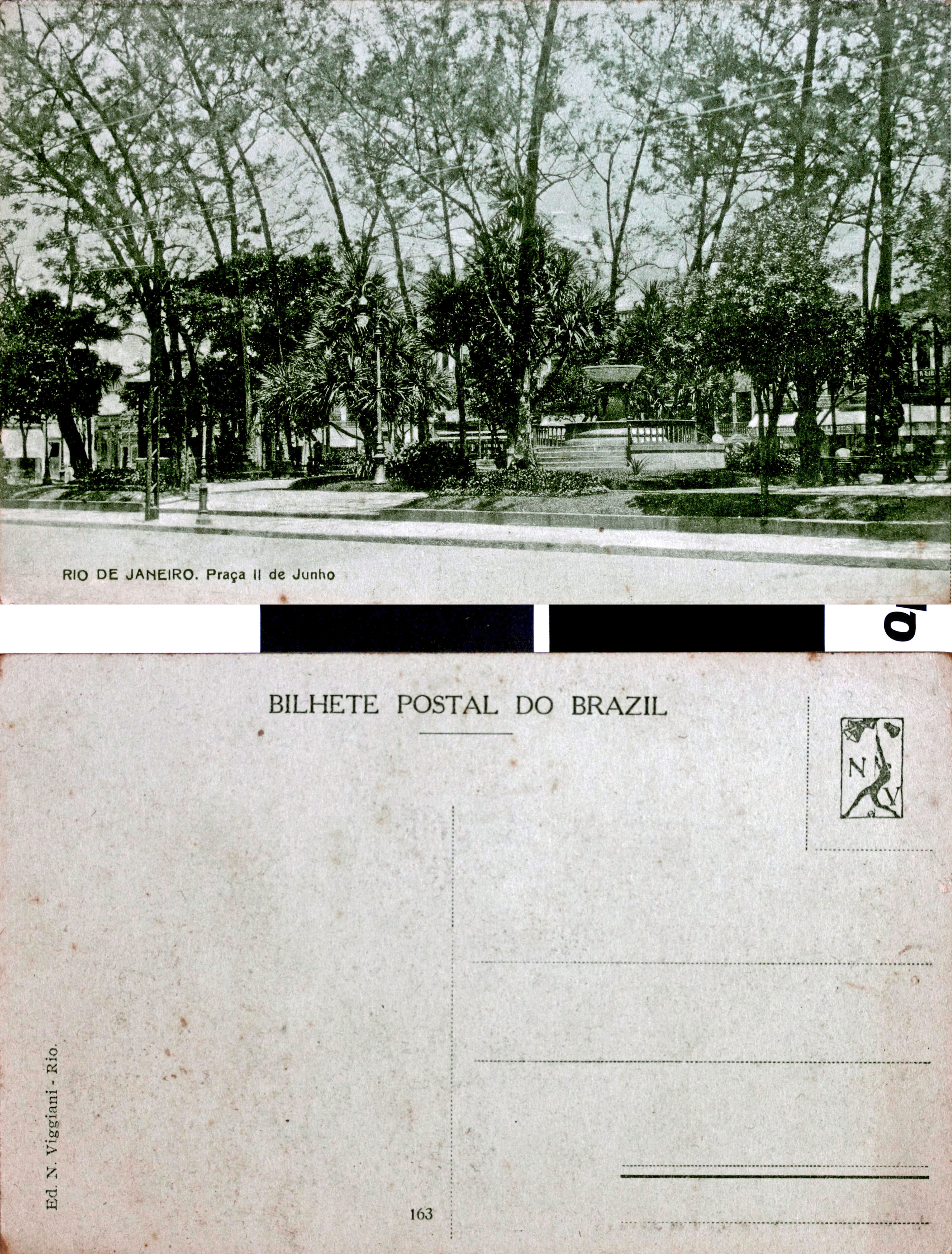 Em 1846, durante o reinado de D. Pedro II foi realizado pelo arquiteto Grandjean de Montigny um projeto para o chafariz que deveria ocupar o chamado Rocio Pequeno, depois chamada Praça Onze de Junho. Com a construção da Av. Presidente Vargas, o chafariz foi transferido para a Praça Afonso Vizeu, no Alto da Boa Vista.